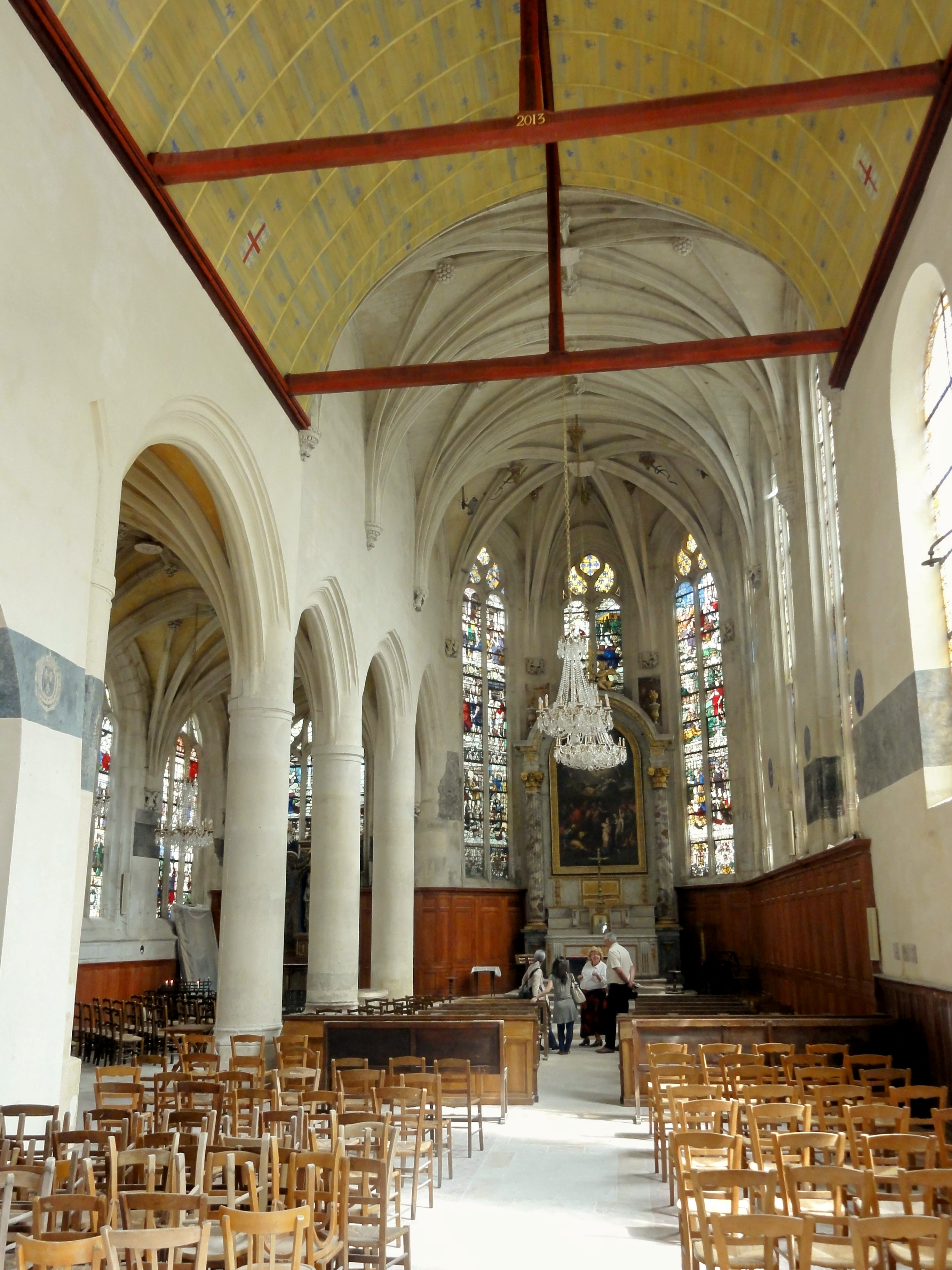 Nef, vue dans le chœur.